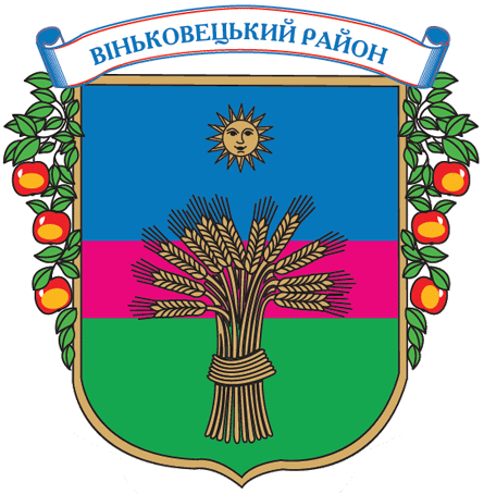 Герб Віньковецького району